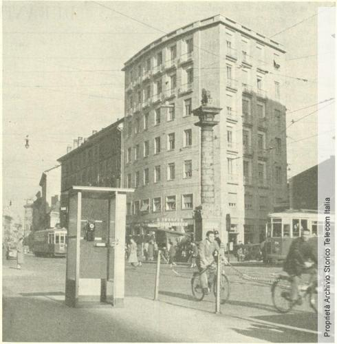 foto della prima cabina telefonica STIPEL installata a Milano in piazza San Babila